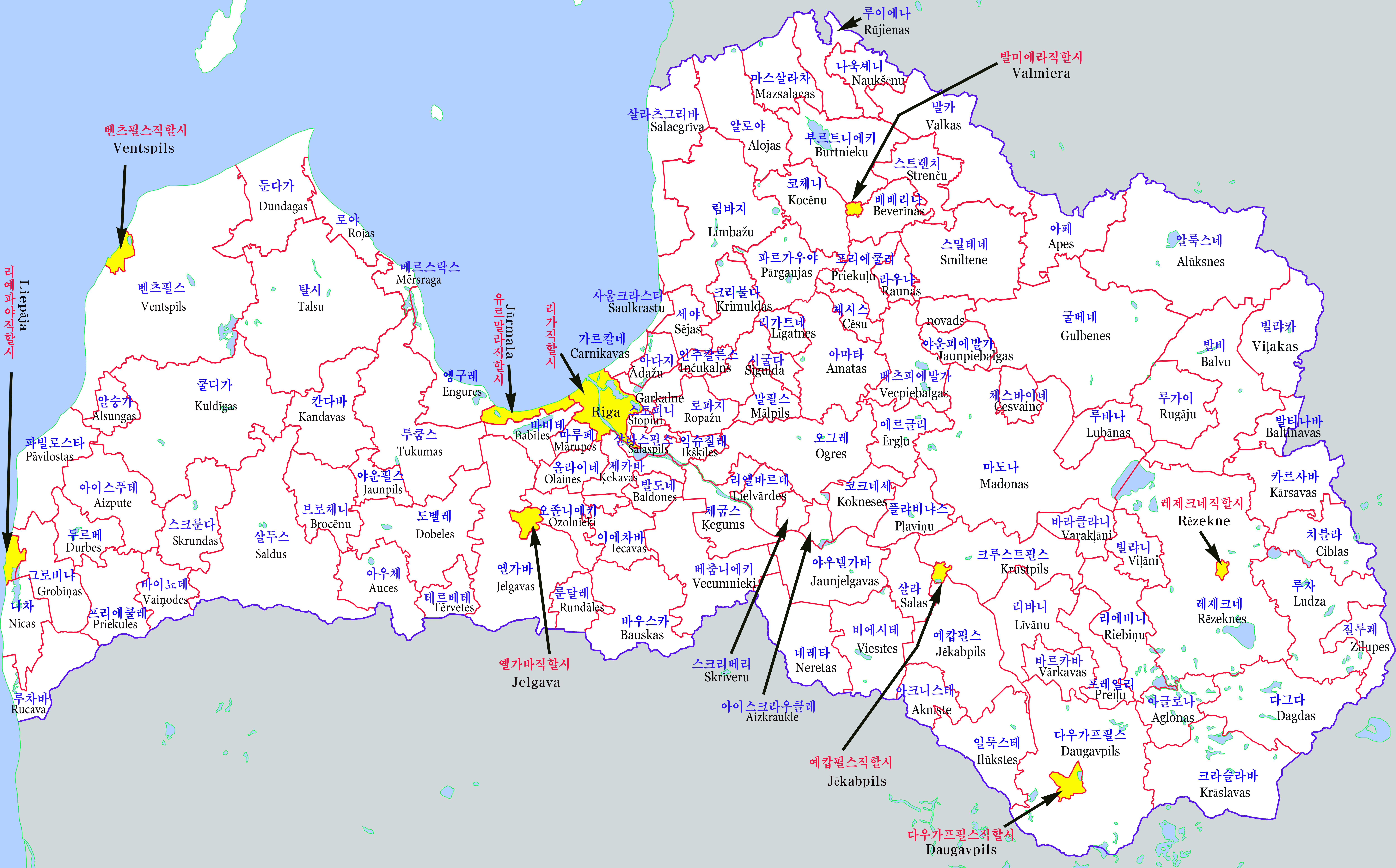 라트비아 행정구역